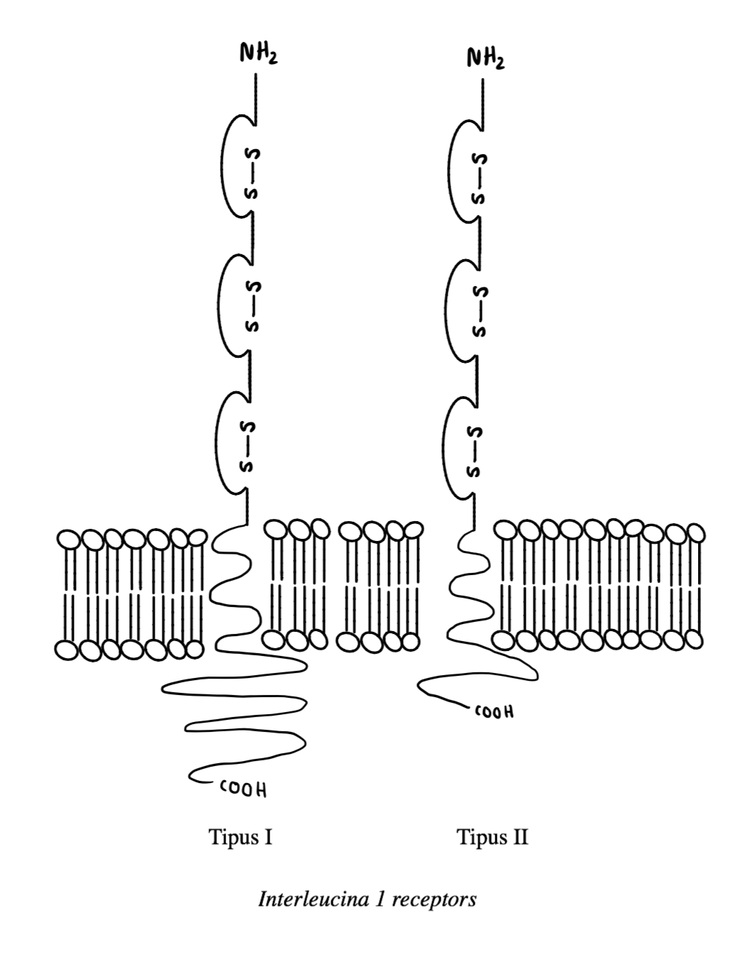 Veiem que les dues estructures dels receptors són molt semblants. Només es diferencien en què el receptor de tipus I té un segment major a la cara interna de la membrana en comparación amb el de tipus II